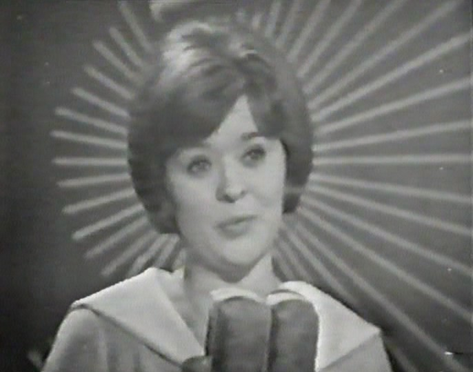 Eurovision Song Contest 1965 Regia di ROMOLO SIENA Allestimento scenografico di FRANCESCO DE MARTINO Luci di GUIDO CARACCIOLO Assistente alla regia ELENA AMICUCCI Assistente di studio MARCELLO SABETTI Capo stuadra tecnica ANGELO FONTANA Prima controllo camere GUSTAVO GALLARATO Capo tecnico audio CIRO PALLONETTO Cameramen ADOLFO BOTTA, SERGIO FREISSENET, ENRICO LANDINI, FLORIDO VARZI ________________________________ Kirsti Sparboe